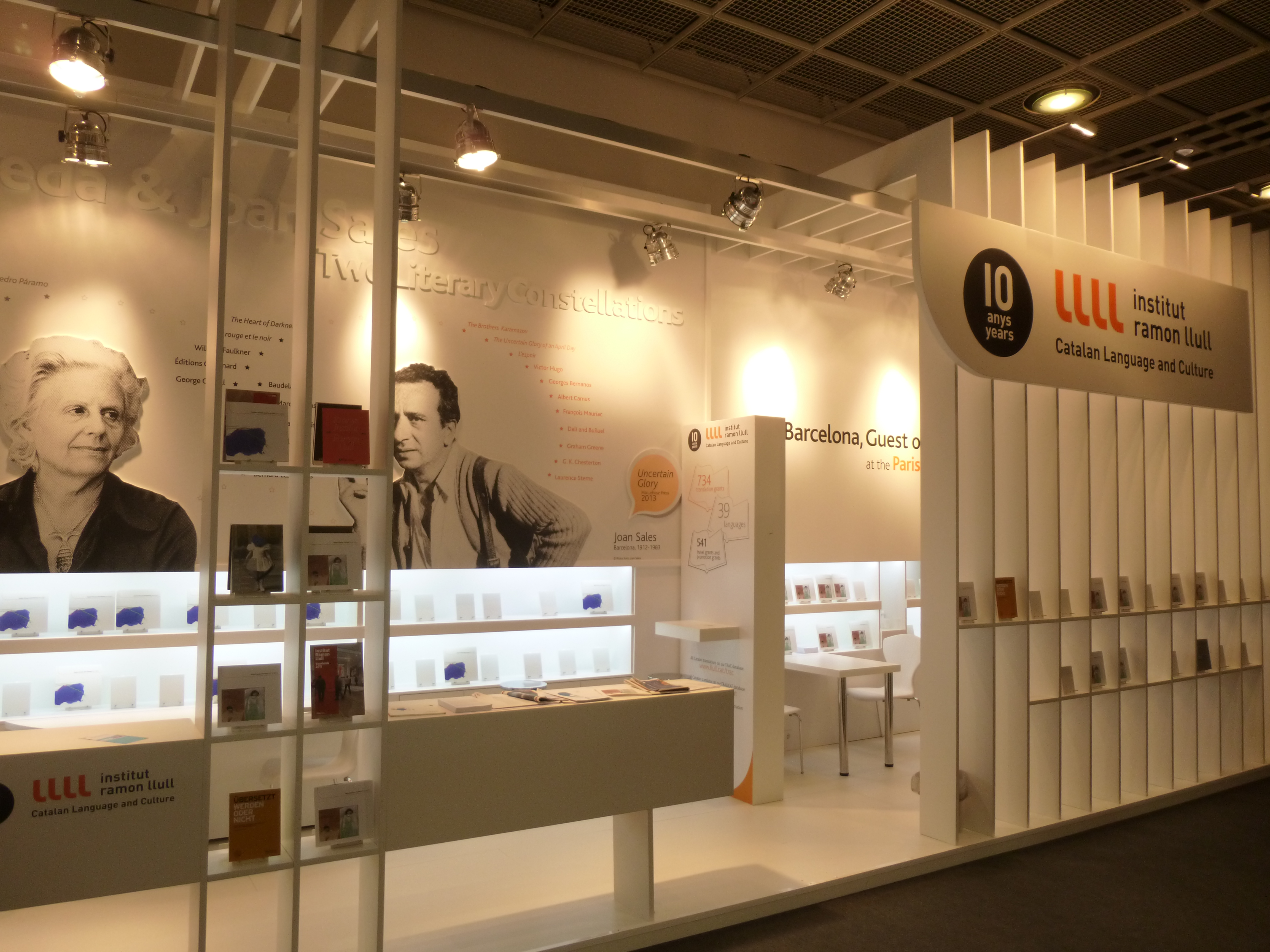 stando de la institucio Institut Ramon Llull pri disvastigo de la kataluna lingvo en la Frankfurta librofoiro 2012